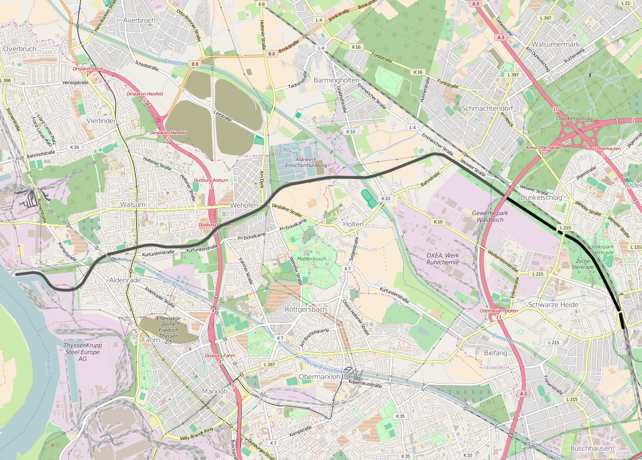 DB 71, Sterkrade - Walsum